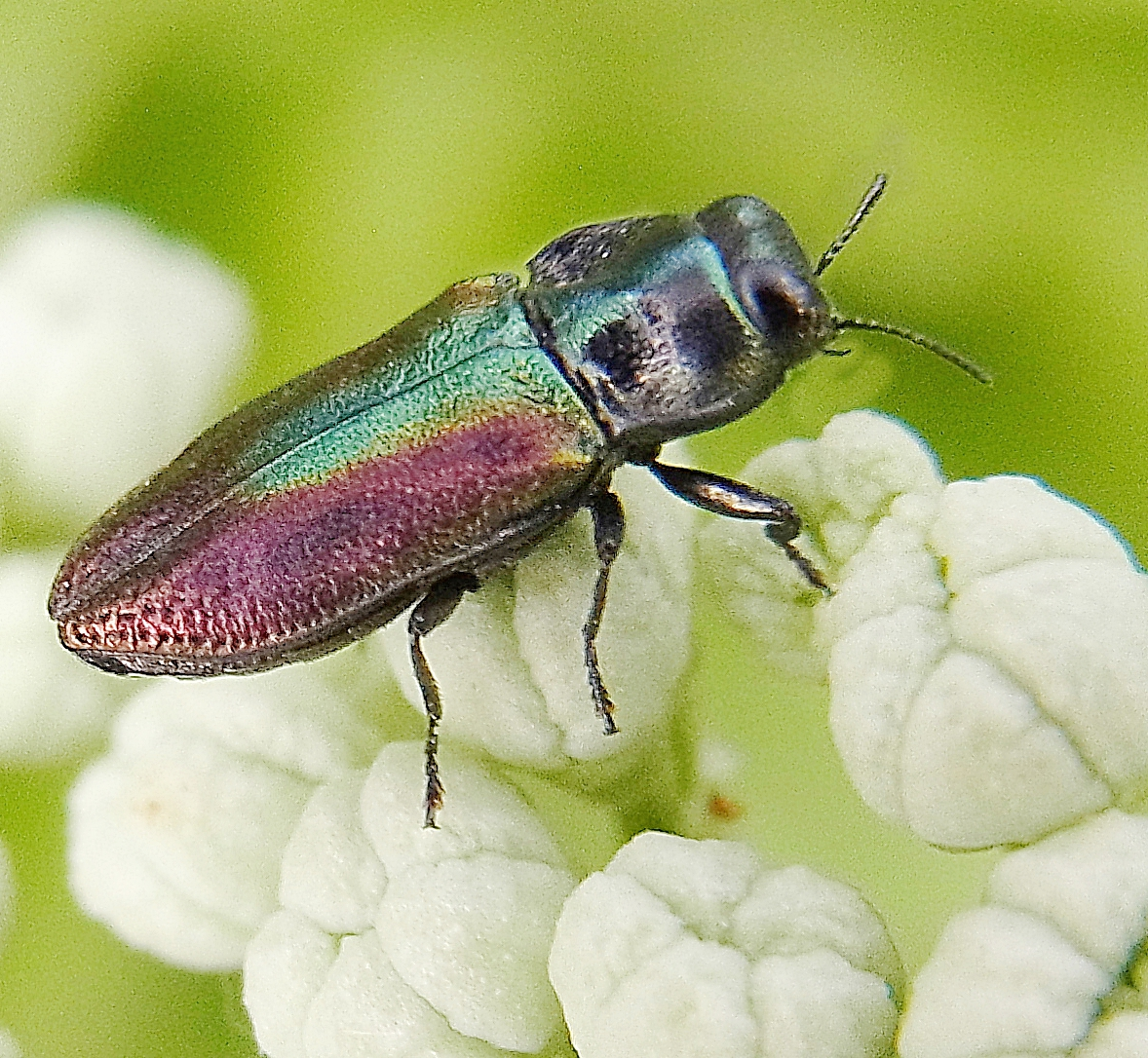 Anthaxia fulgurans aus Ungarn, Börzsöny-Berge über Nagymaros